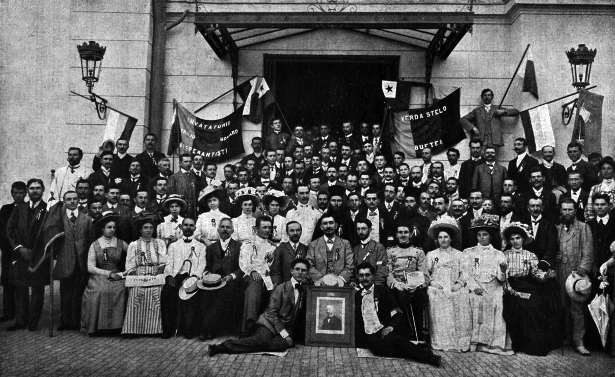 Unua Esperanto-kongreso en Rumanio